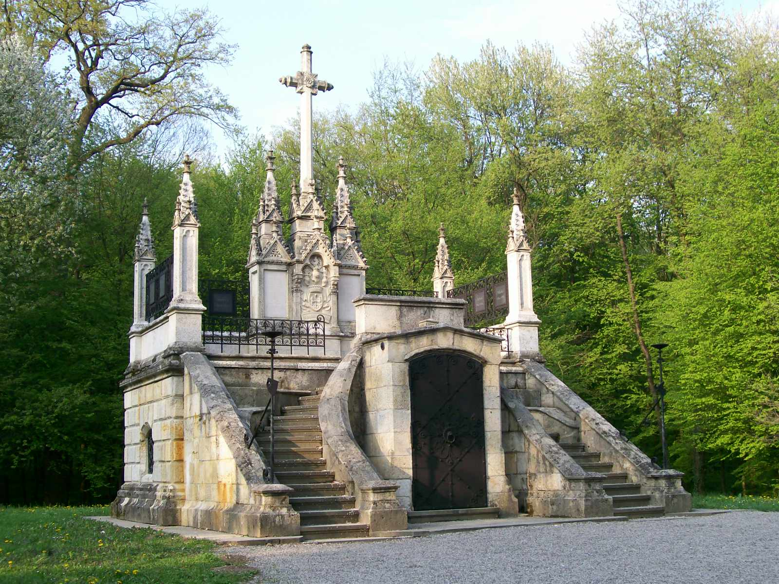 Grobnica obitelji Jelačić pokraj Novih dvora, Zaprešić